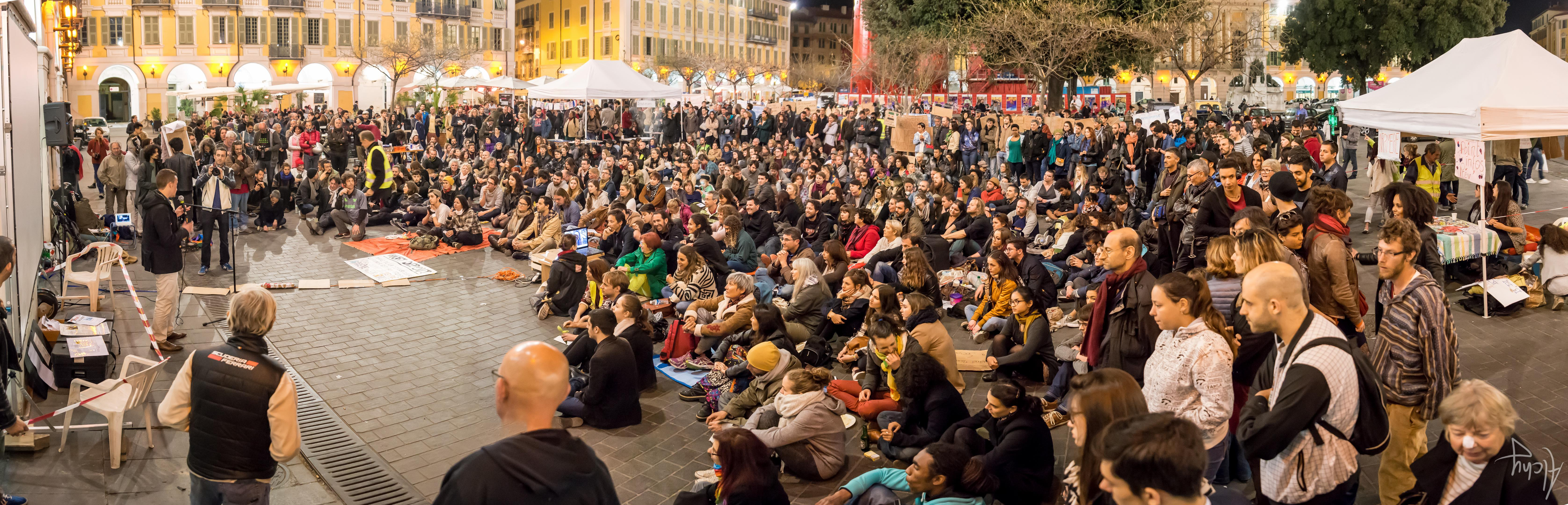 Assemblée de la Nuit Debout à Nice du 46 mars 2016